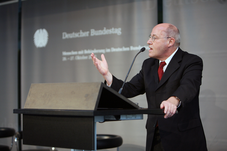 Behindertenhonferenz im Bundestag